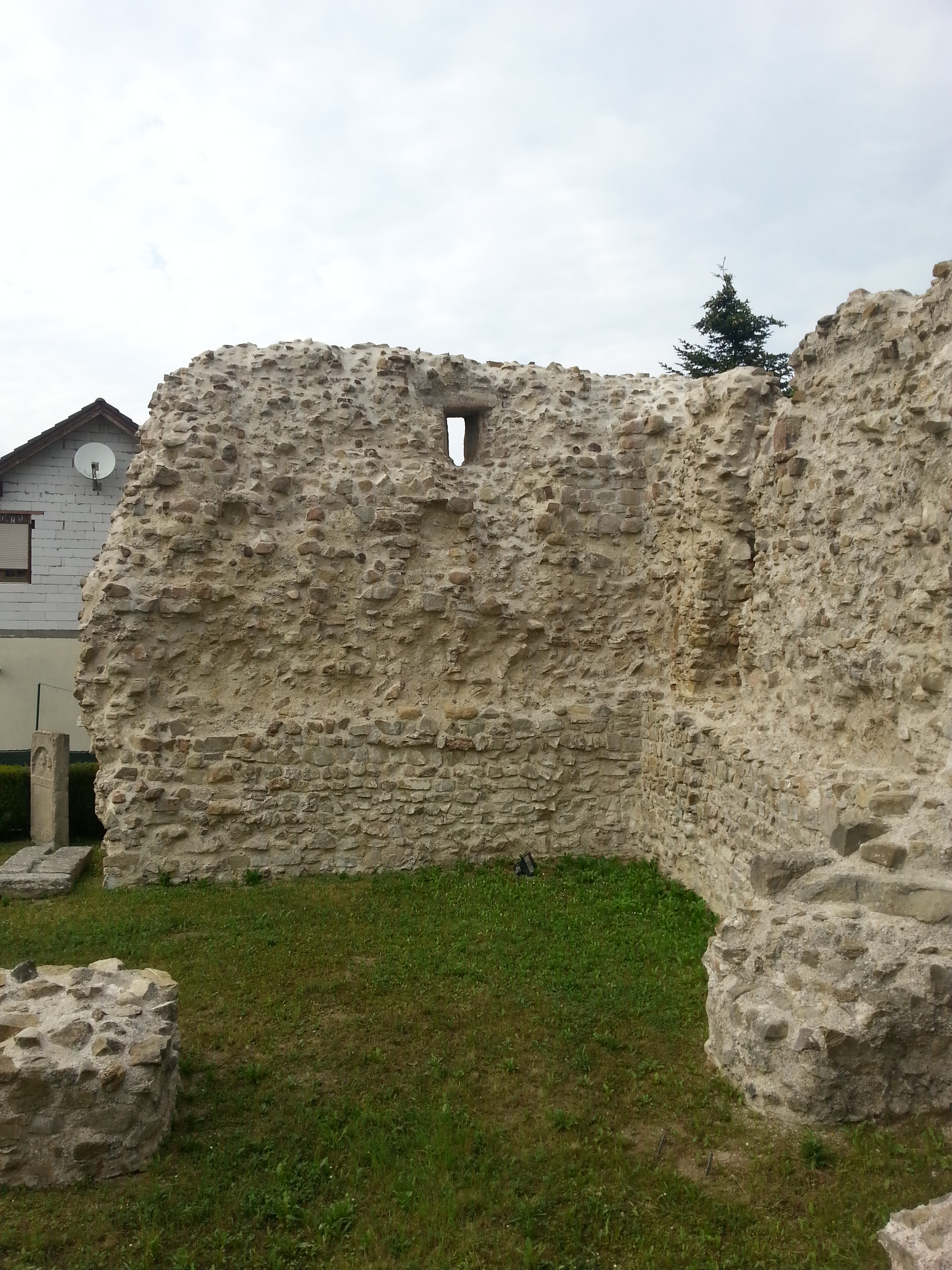 Burgus Zeiselmauer (Niederösterreich) 2018, Rest der Nordmauer mit Schlitzfenster.